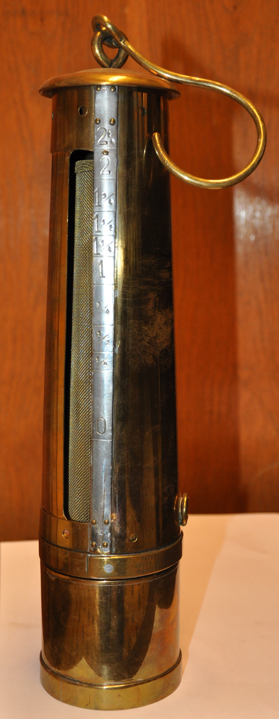 Originál lihová indikační lampa, patent Brouček, vyroben firmou Josef Jermář & company v roce 1908, Marienberg (Mähren).